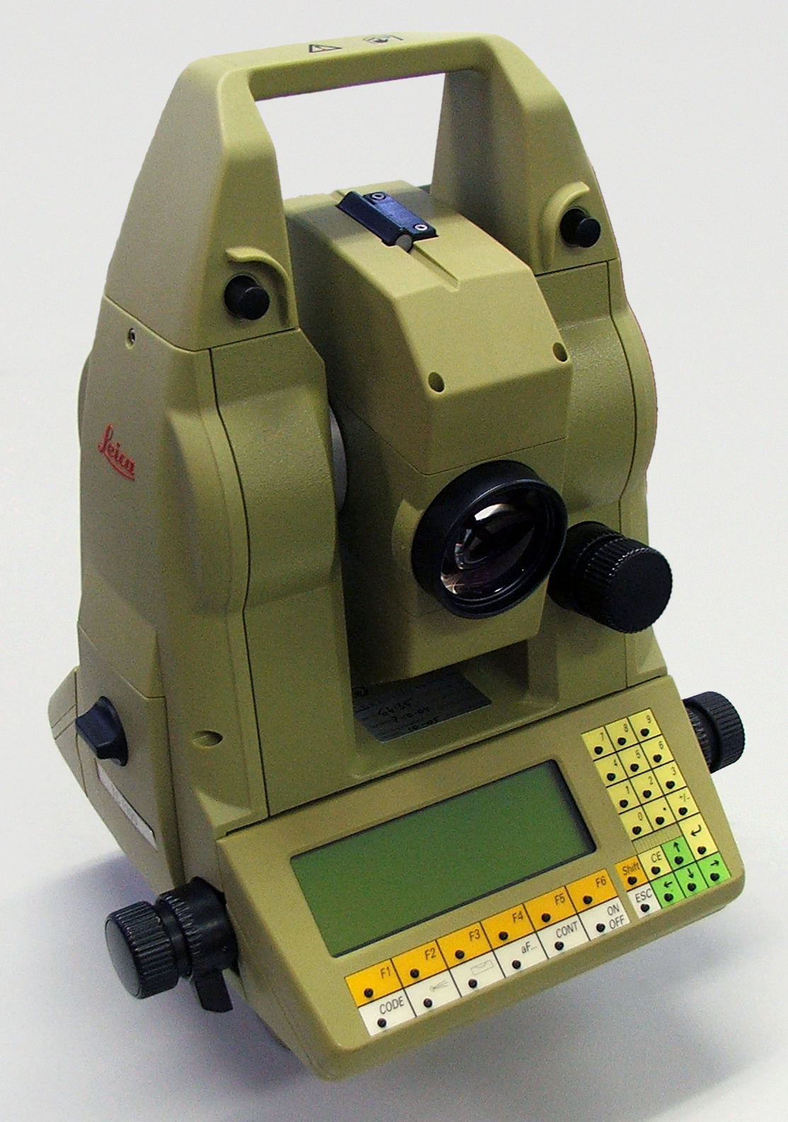 Leica TC1100, Geodetic, Instrument